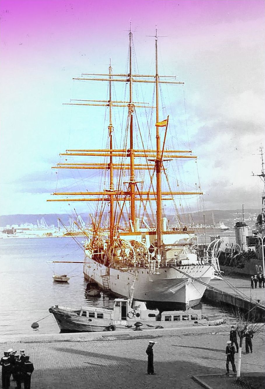 Foto realizada por Arminio Sánchez Mora cuando estuvo embarcado en el Galatea. Utilizada por Arminio Sánchez Mora para sus libro "El buque escuela Galatea: un guiño al pasado" de editorial Prósopon editores ISBN 9788493739782 y para el libro El velero Galatea ISBN 978-84-942678-8-8 de la editorial Nautical Unión